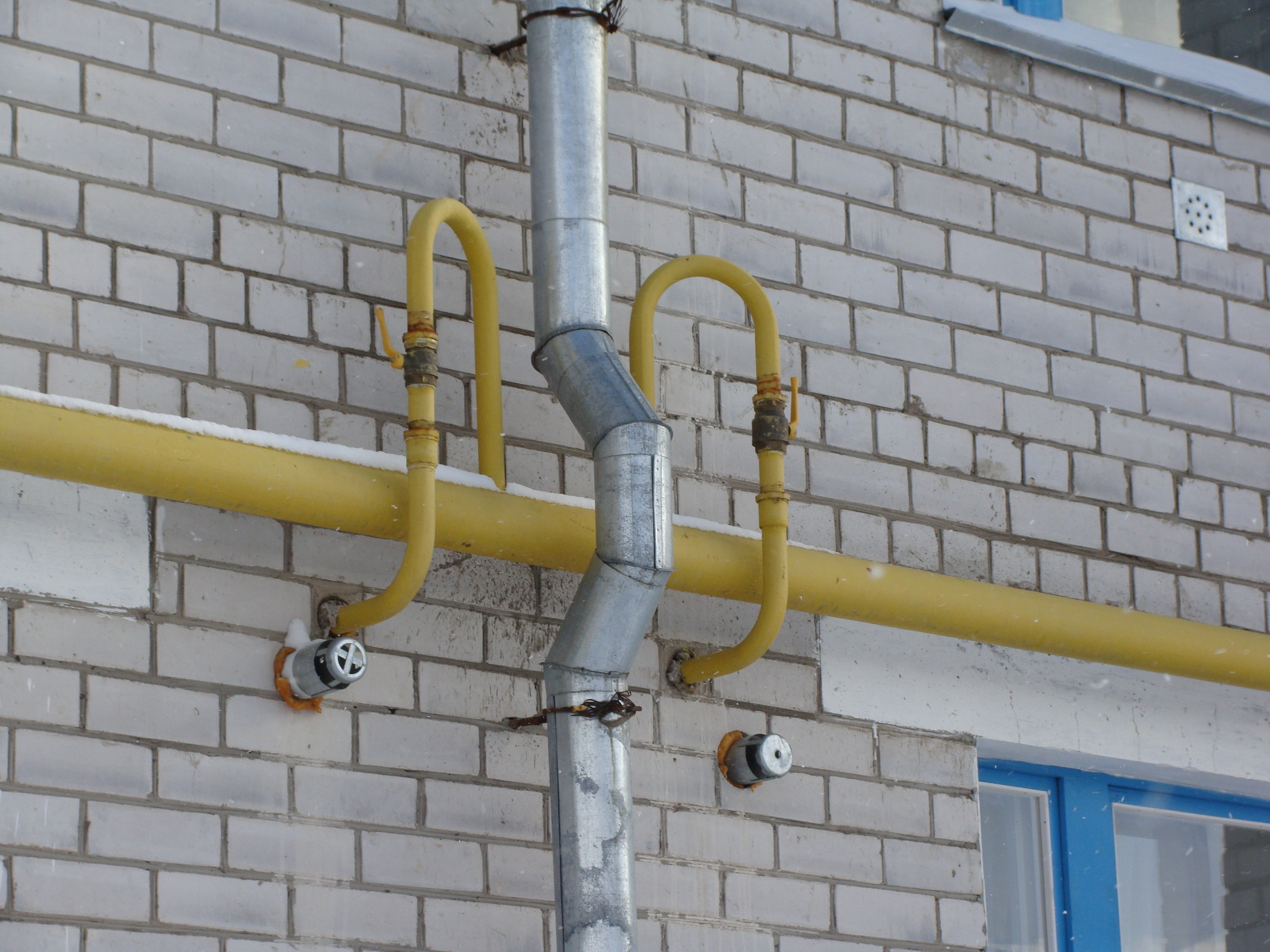 Ввод газа в квартиру